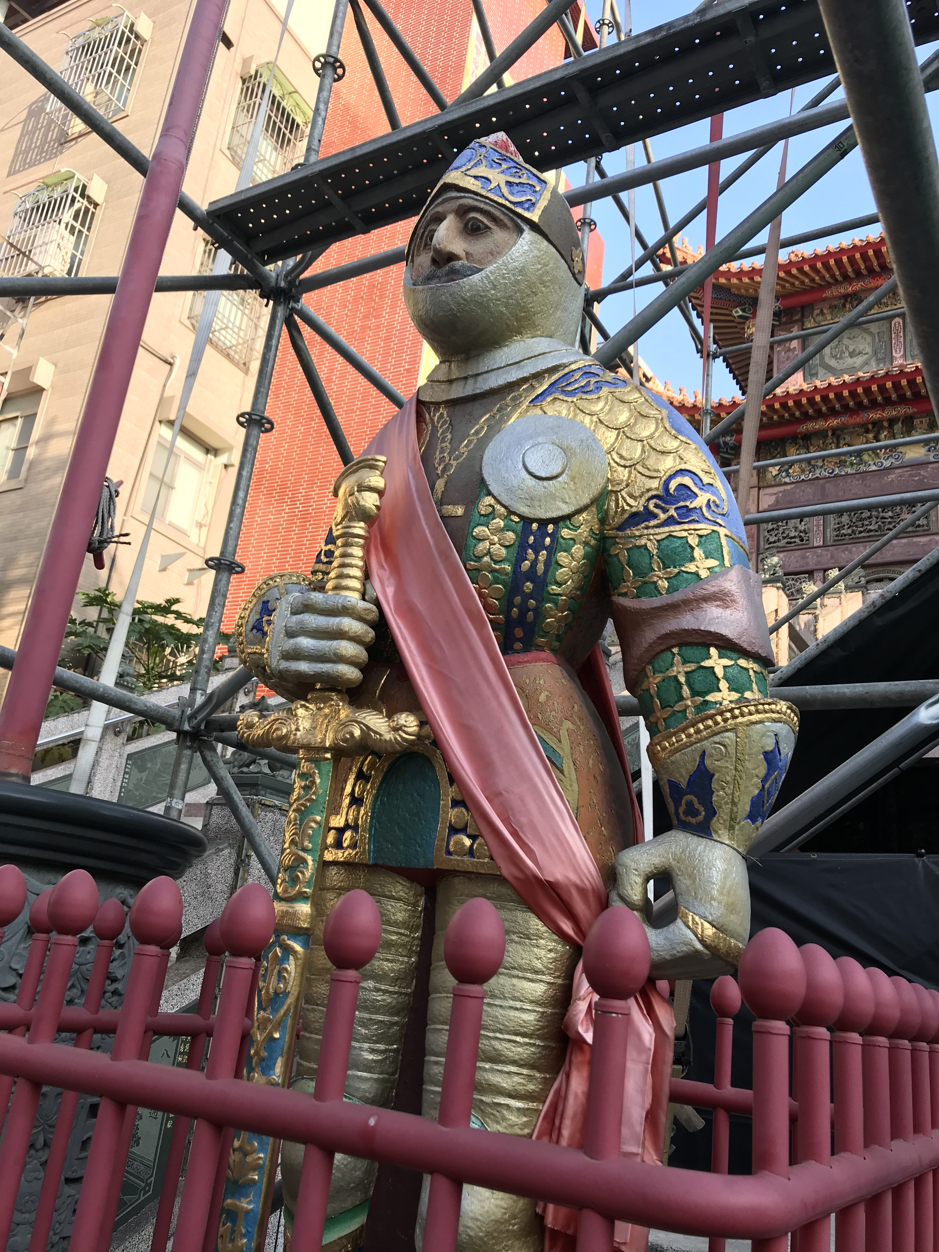 高雄關帝廟武士石像